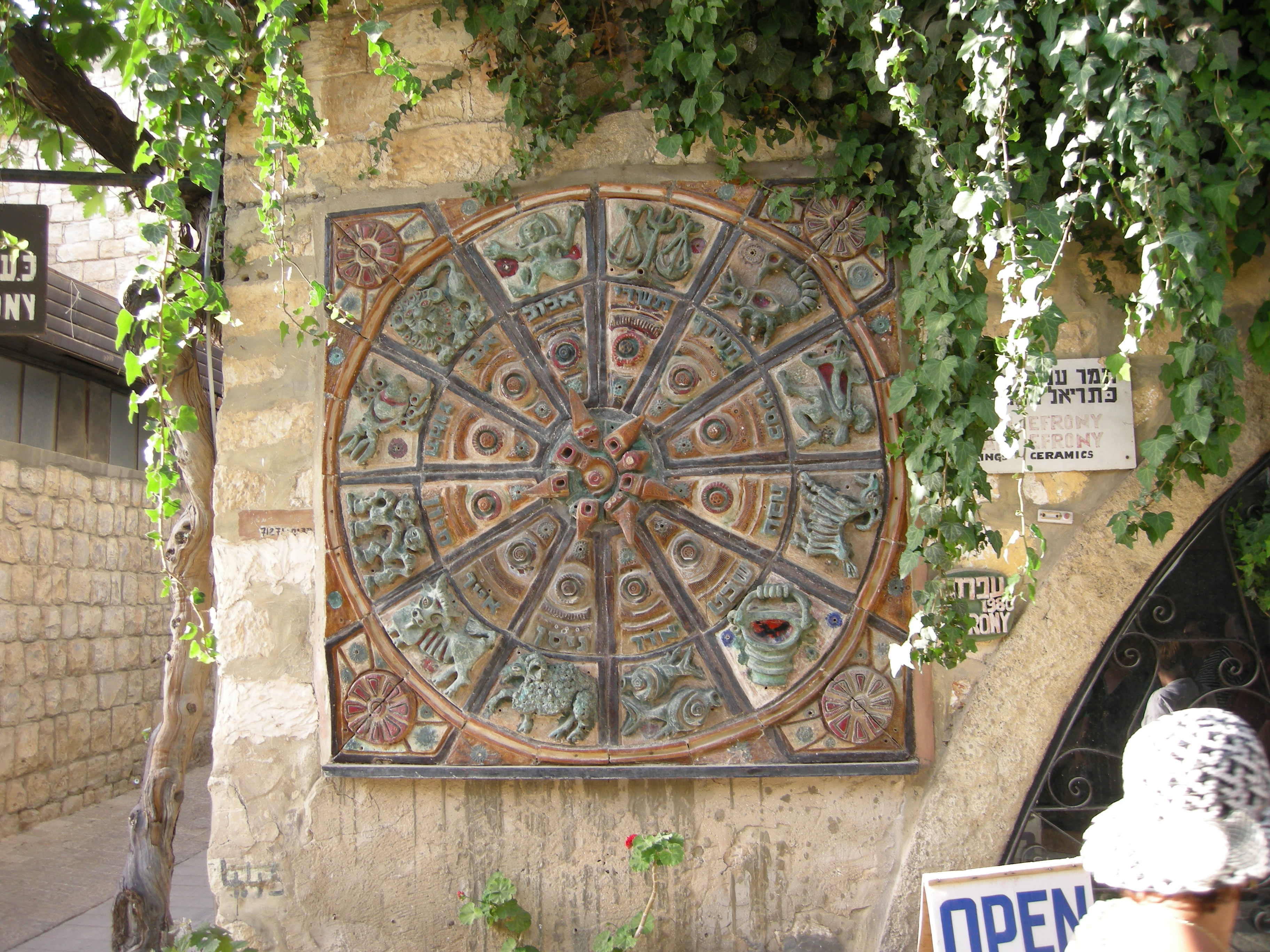 Safed